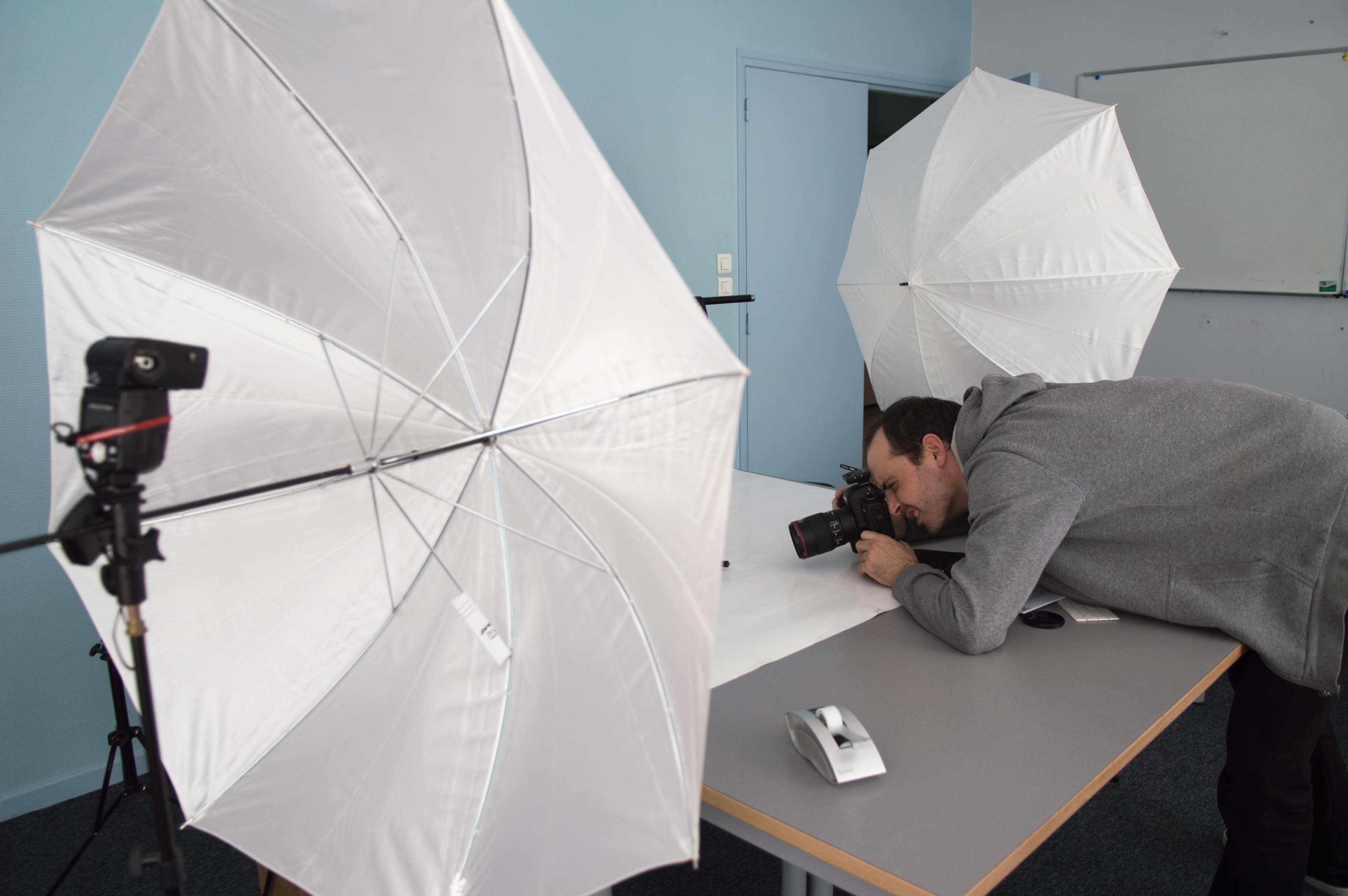 Séance photos pour un article du magazine universitaire.